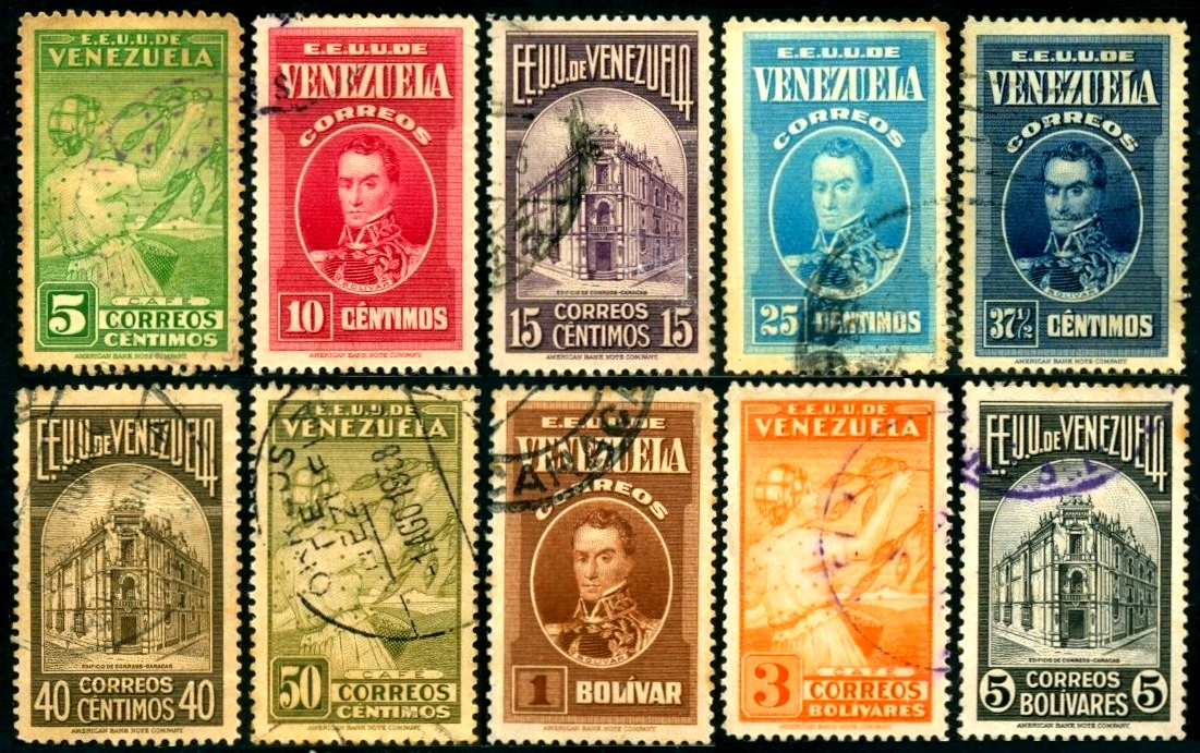 Subsidio a la producción del café y el cacao guepo de estampilas venezolana emitidas en 1938 0.05 Bs Verde claro emision total de ejemplares 600,000.00 0.1 Bs Rosado emision total de ejemplares 600,000.00 0.15 Bs Violeta emision total de ejemplares 200,000.00 0.25 Bs Azul claro emision total de ejemplares 2,250,000.00 0.37 Bs Azul oscuro emision total de ejemplares 100,000.00 0.4 Bs Castaño emision total de ejemplares 50,000.00 0.5 Bs Verde emision total de ejemplares 50,000.00 1 Bs Castaño emision total de ejemplares50,000.00 3 Bs Anaranjado emision total de ejemplares 25,000.00 5 Bs Negro emision total de ejemplares 25,000.00